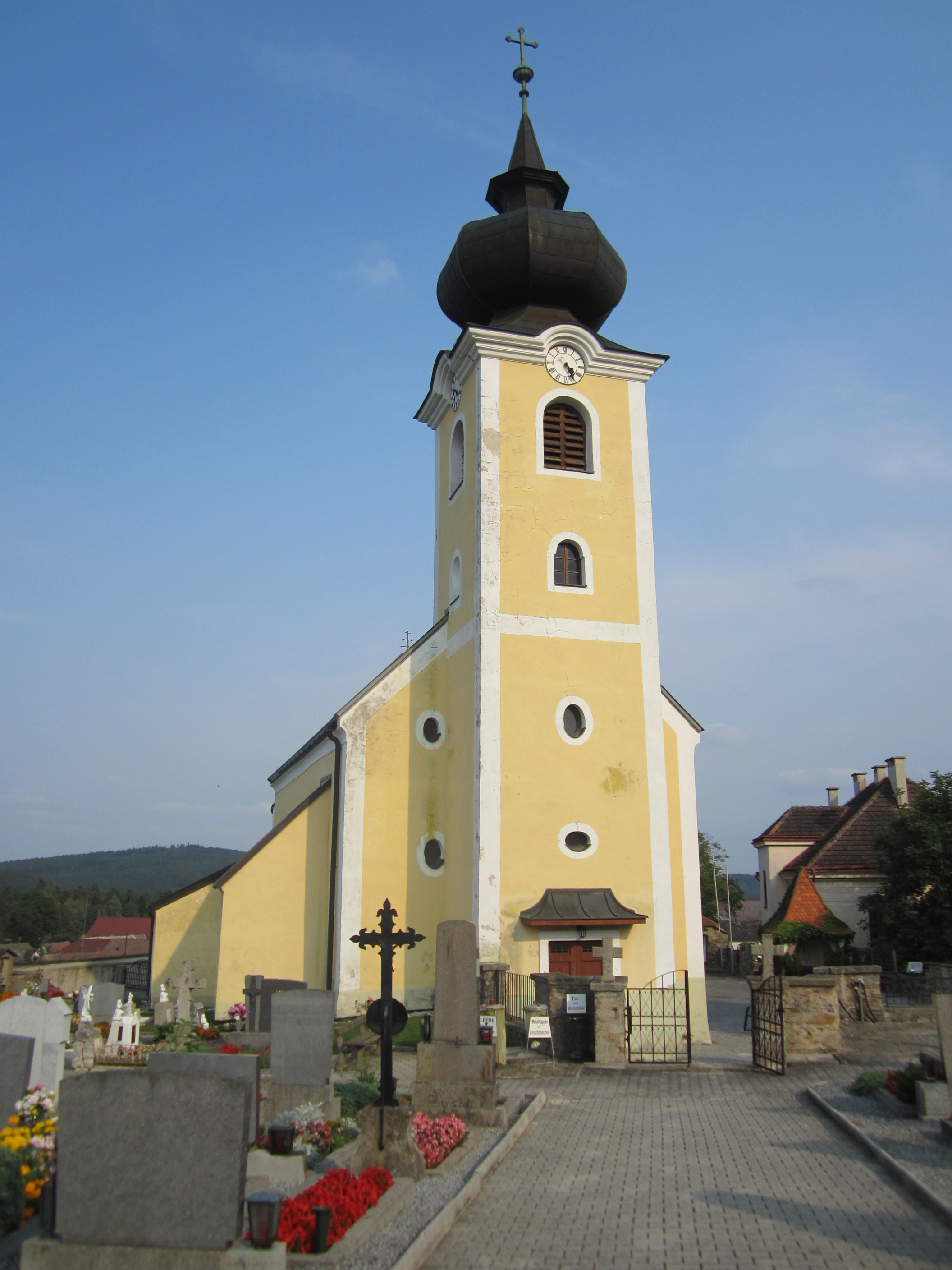 Im Kern gotische, später barockisierte Pfarrkirche mit barockem Westturm; urkundlich erwähnt 1180; Erweiterungen 1781, 1784 und 1864. Object location48° 53′ 35.48″ N, 15° 23′ 08.12″ E